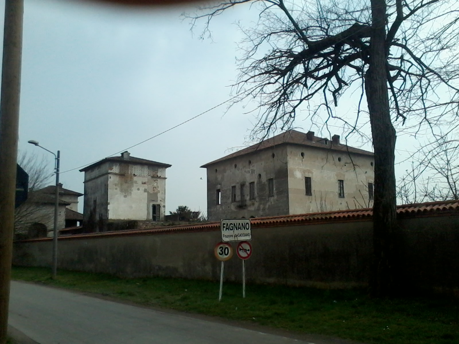 Vista dell'ingresso della frazione di Gaggiano col Palazzo Doria Borromeo Medici a Fagnano, Gaggiano (MI) - Italy